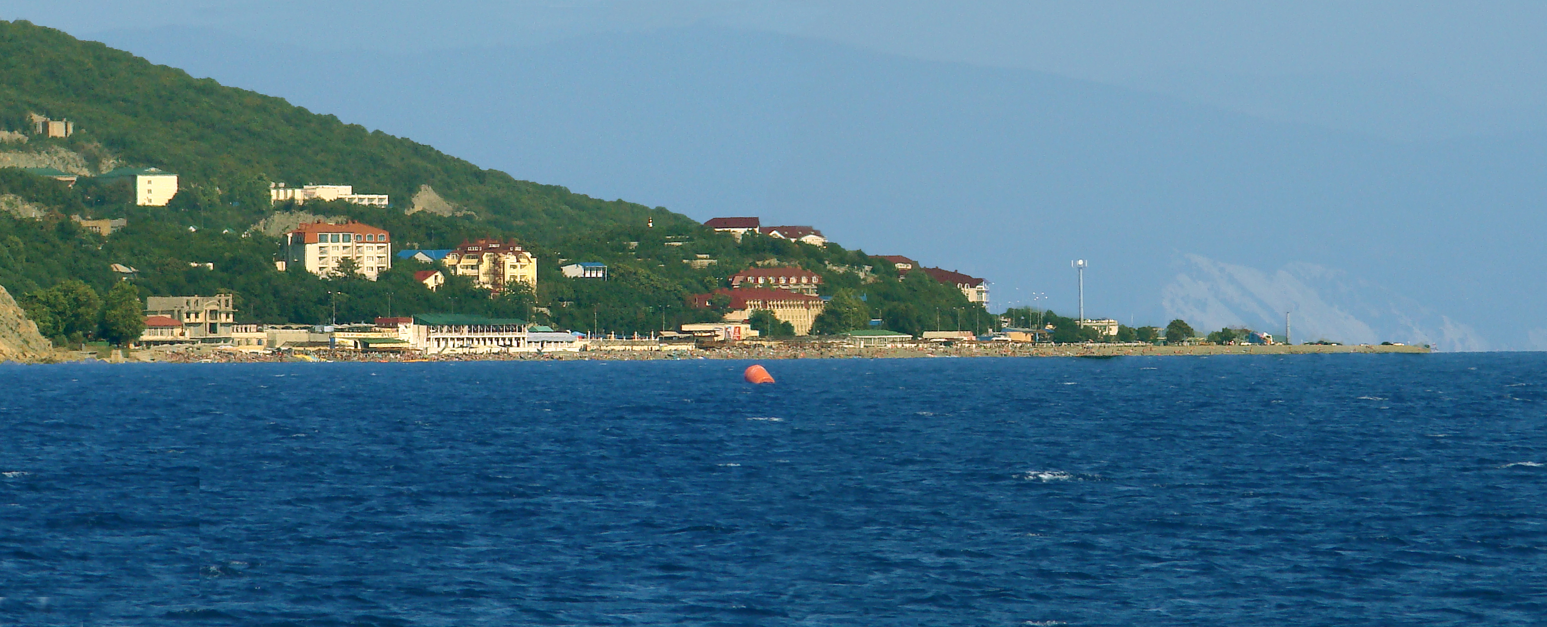 Центральная часть урочища Широкая Балка, Новороссийск. Вечер.